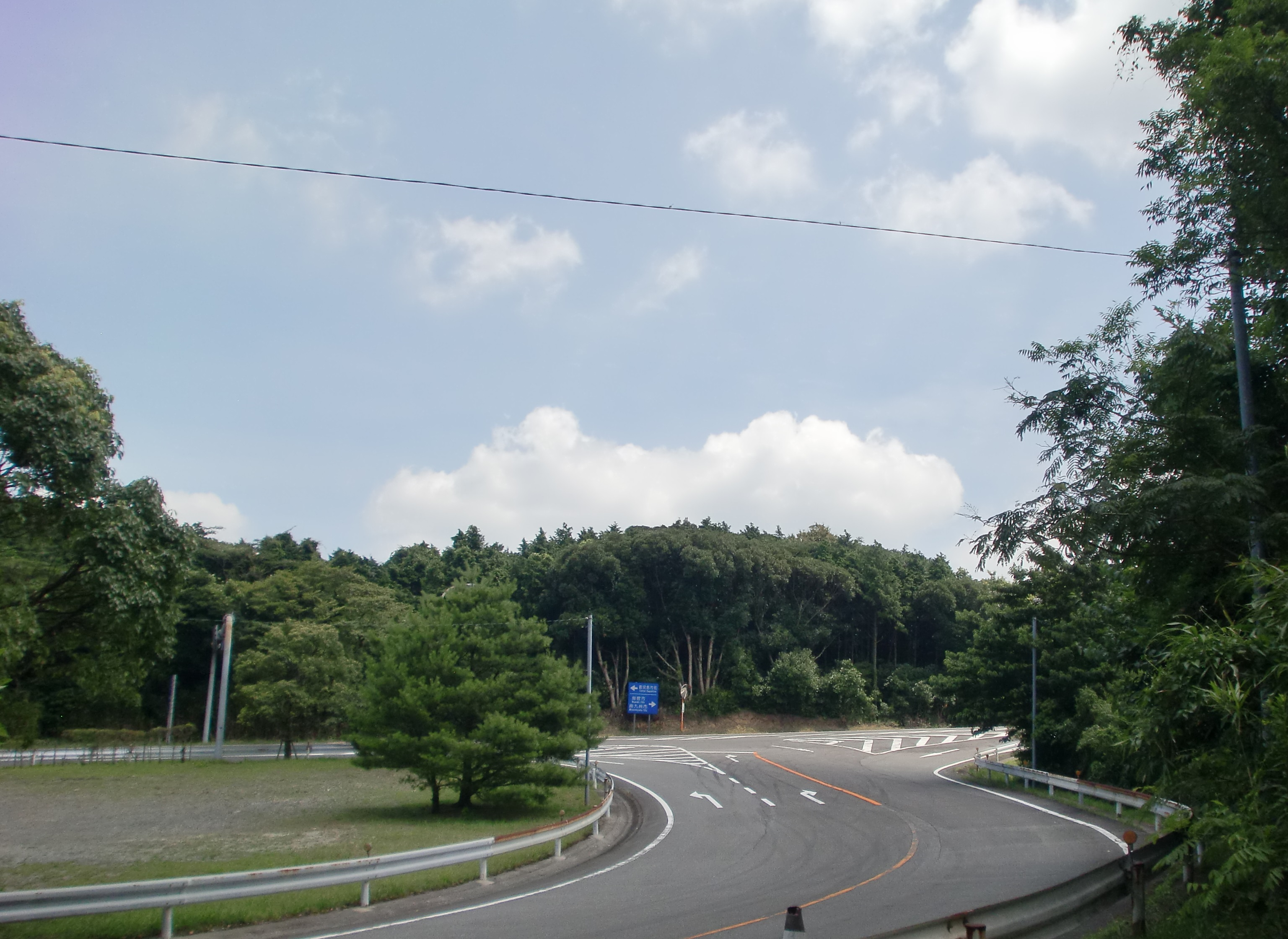 錫山インターチェンジの本線と出入口の交差点。有料道路としては珍しい丁字路型の信号機が設置されていない交差点となっている。（有料道路区域外の道路から撮影）